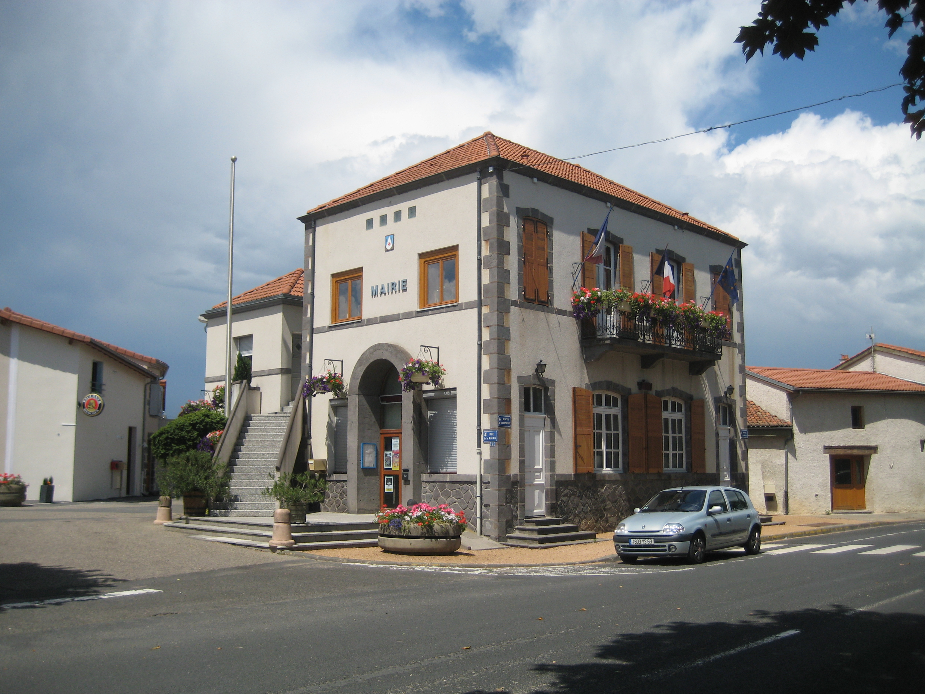 Mairie de Chappes